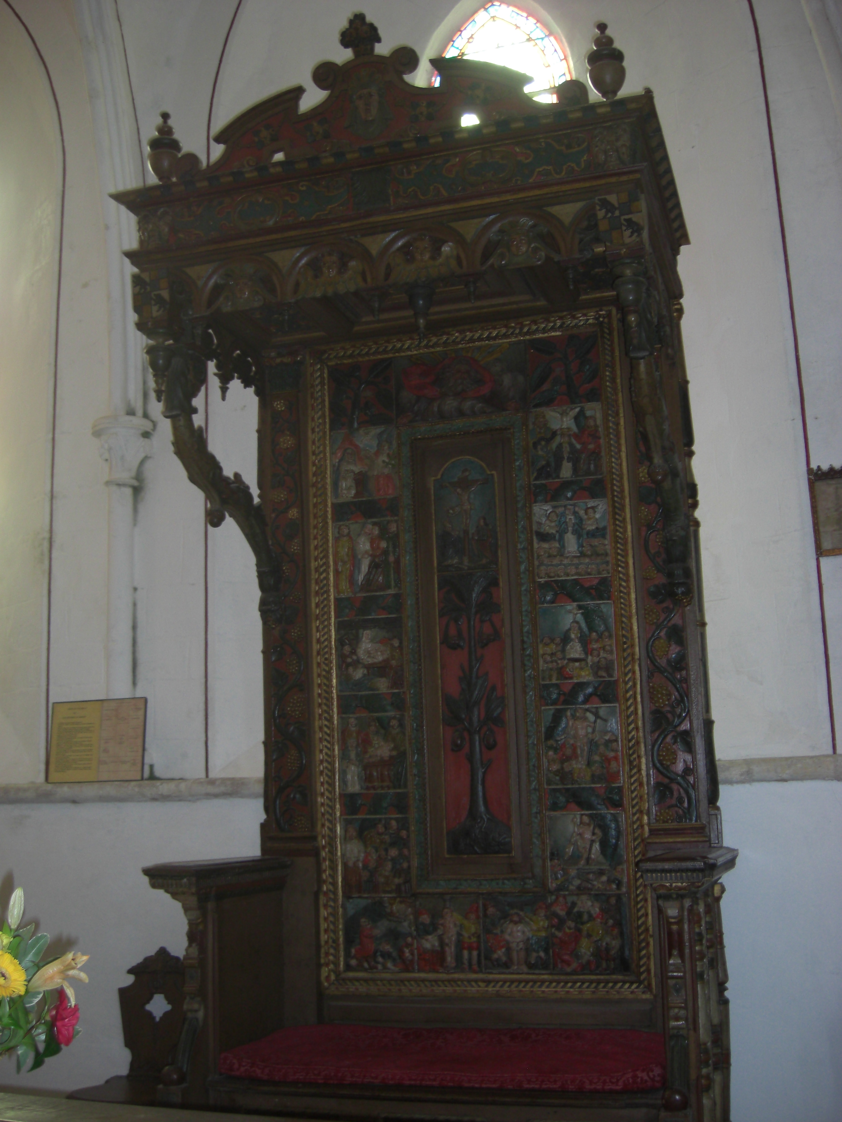 Trône de Célébrant Les Mystères du Rosaire Eglise Saint-Jean-Baptiste Omonville-la-Rogue